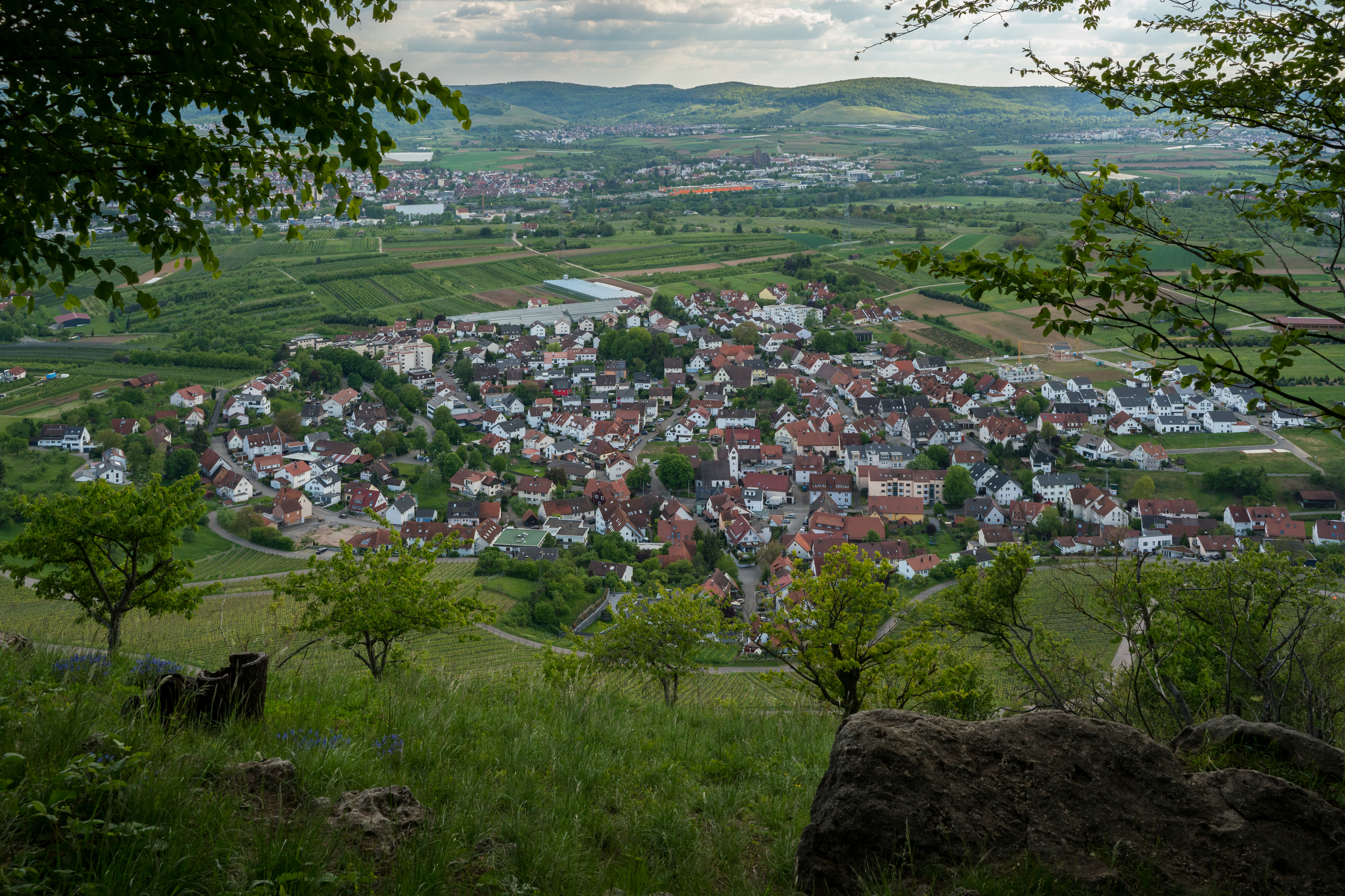 Blick vom Kleinheppacher Kopf auf Kleinheppach.